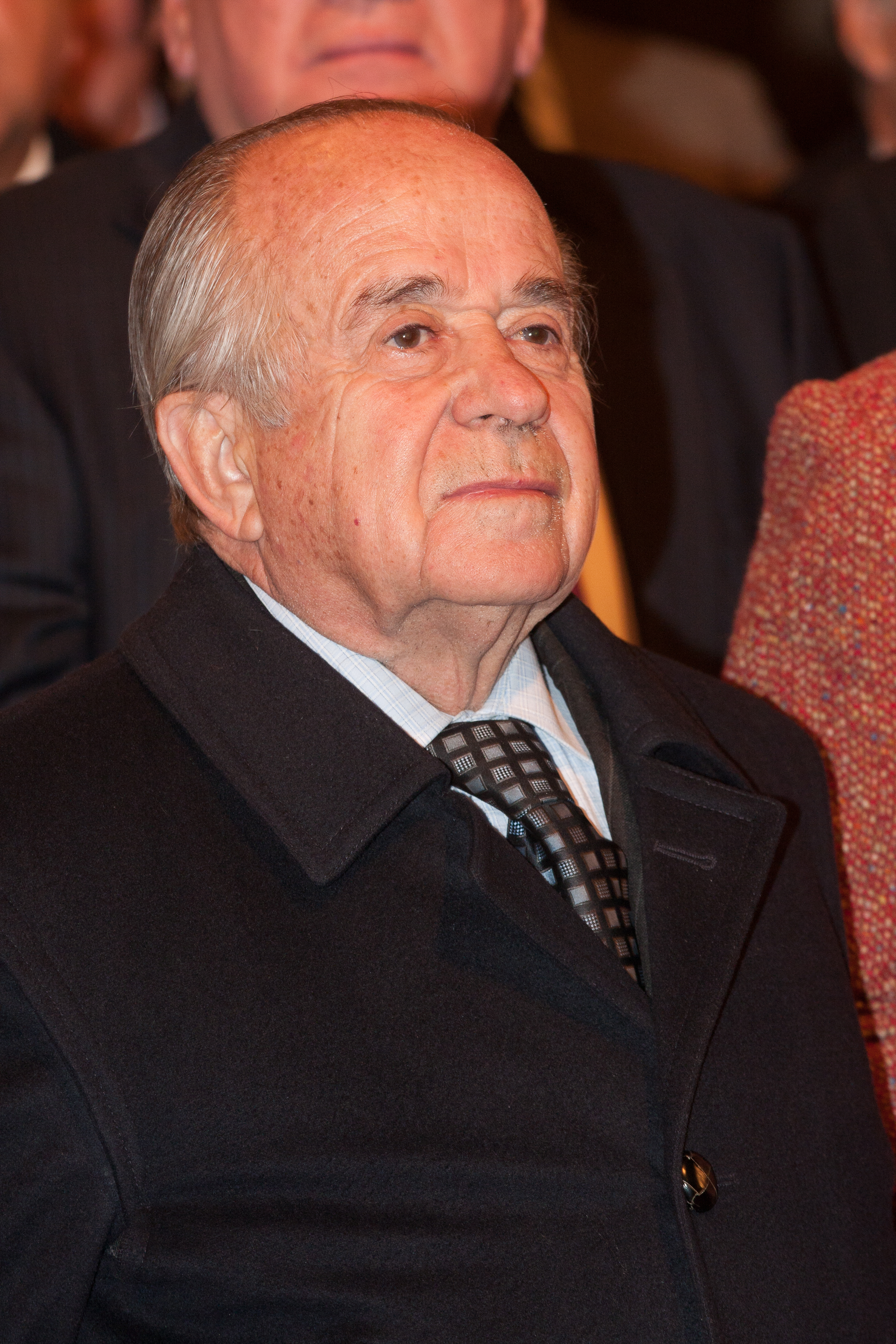 José Andrés Rafael Zaldívar Larraín (Santiago, 18 de marzo de 1936) es un abogado y político democratacristiano chileno, ex presidente del Senado de su país, además de ex ministro de Estado de los presidentes Eduardo Frei Montalva y Michelle Bachelet. En la actualidad es senador por El Maule Norte. Una promesa solemne de los parlamentarios para poner todo el empeño “en hacer de Chile una Patria de hermanos, donde cada uno tenga pan, respeto y alegría, donde reine la paz, la justicia, la solidaridad, y para que Chile sea una nación bendecida por Dios, tierra de encuentro y esperanza” fue uno de los momentos culminantes del Te Deum Ecuménico, el segundo de los eventos de conmemoración del Bicentenario del Congreso Nacional, realizada este domingo 3 de julio del 2011.